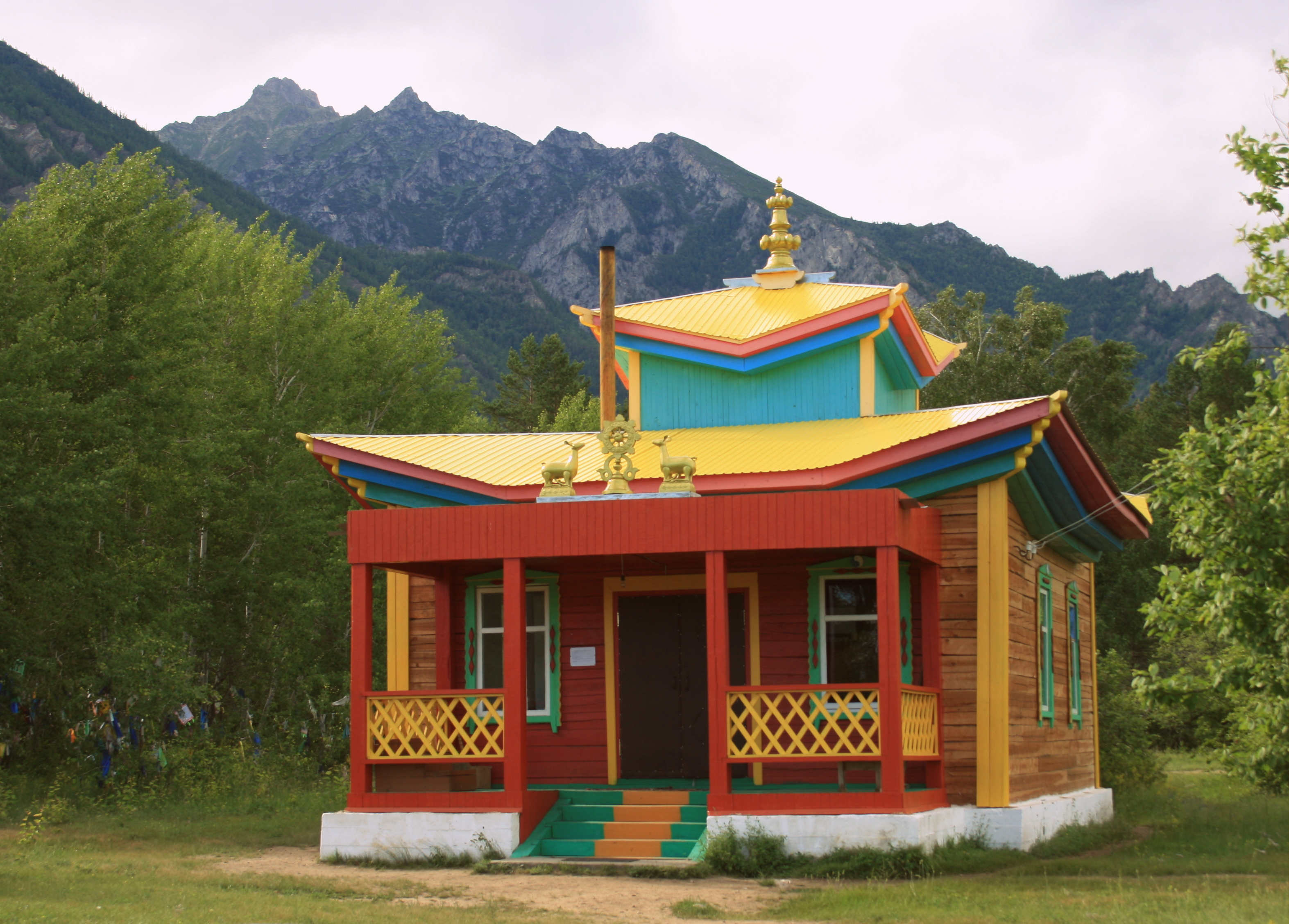 Баргузинский дацан. Село Ярикто, Баргузинский район, Бурятия